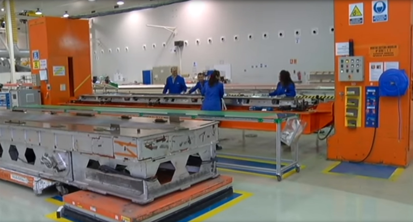 Visita a la Compañía Aciturri en Boecillo (provincia de Valladolid).